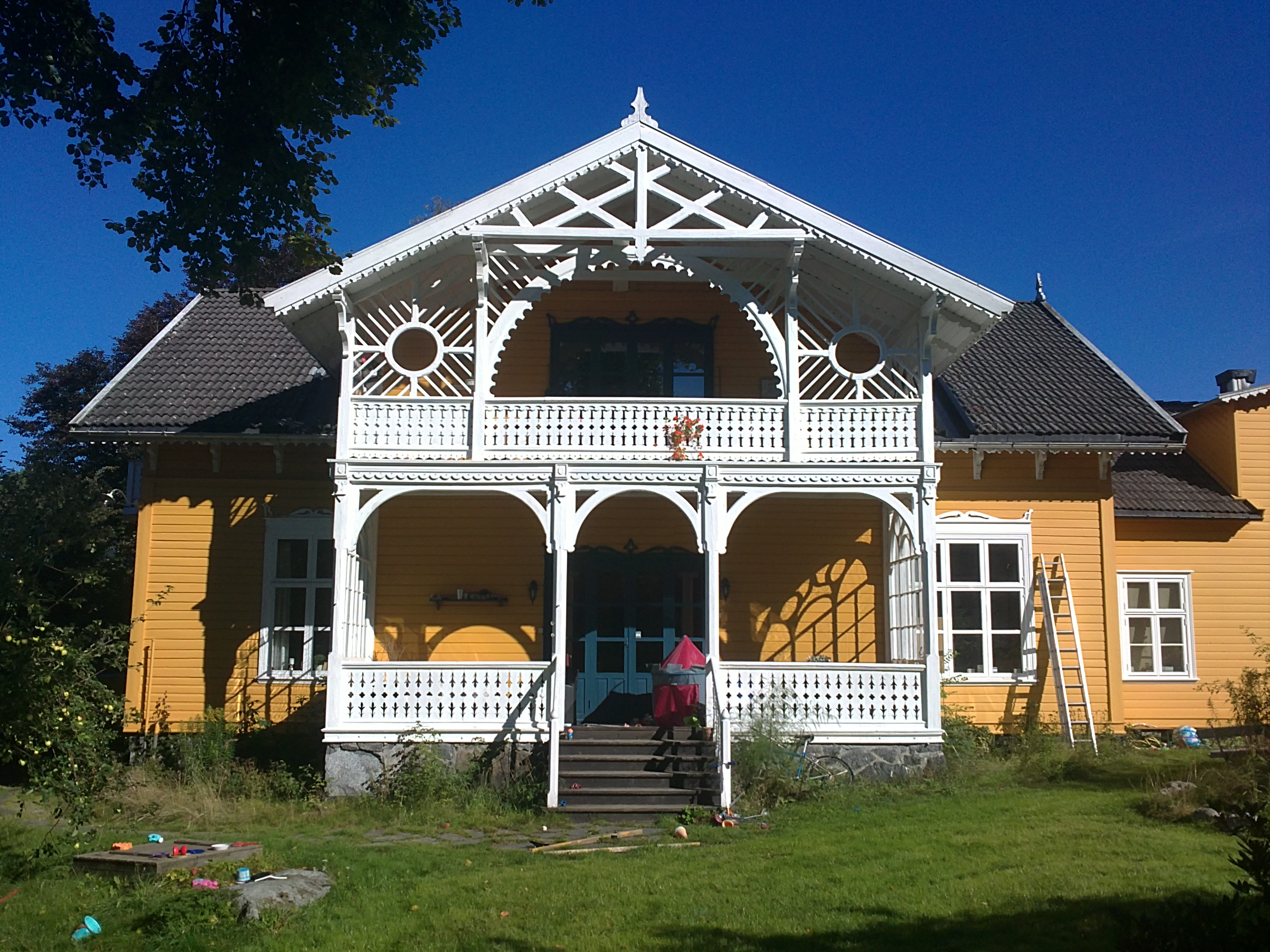 Bilde av Kirkestredet 11, "Lilleodden"